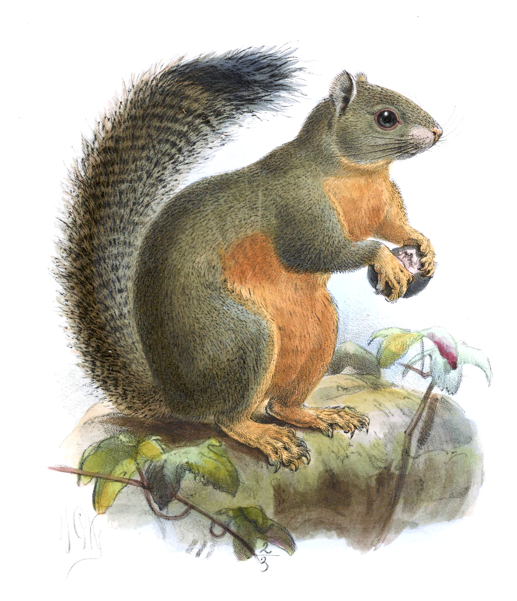 Sciurus blandfordi = Callosciurus phayrei